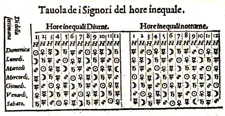 Tabella delle ore planetarie, che mostra il pianeta dominante per ogni ora dei diversi giorni della settimana